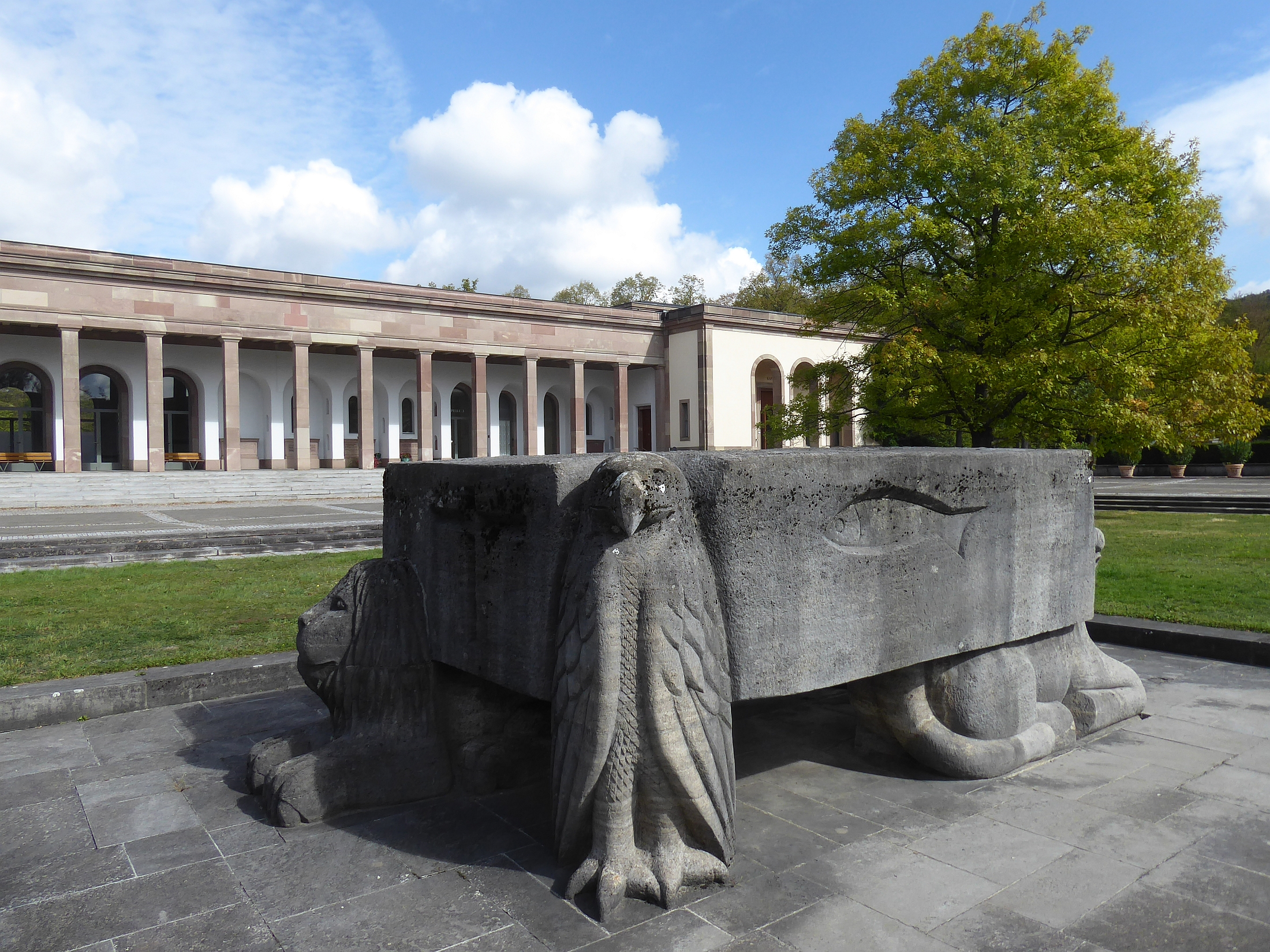 Peter Moilliet (1921–2016) Bildhauer, Die vier Evangelistensymbole auf dem Friedhof am Hörnli, 1966